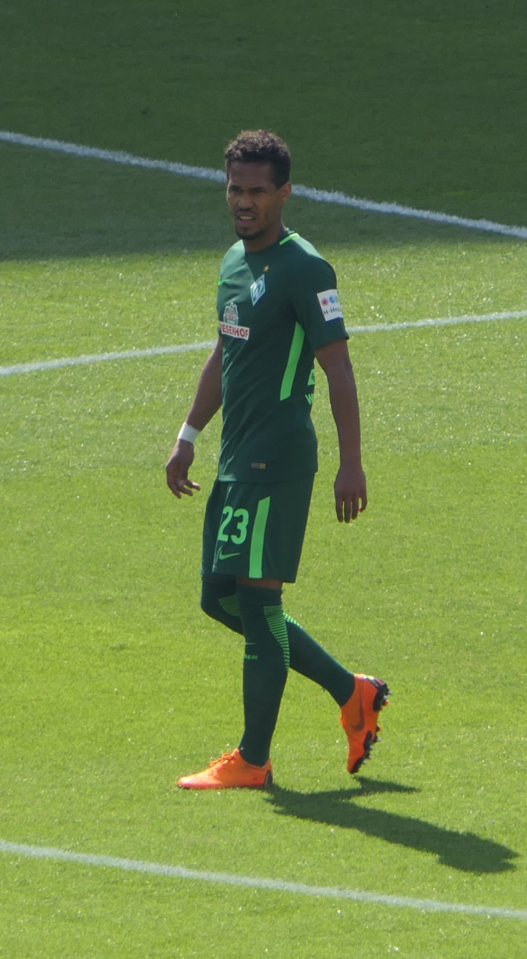 Der Fussballprofi Theodor Gebre Selassie im Trikot vom SV Werder Bremen beim Auswärtsspiel gegen den VfB Stuttgart am 21.04.2018.